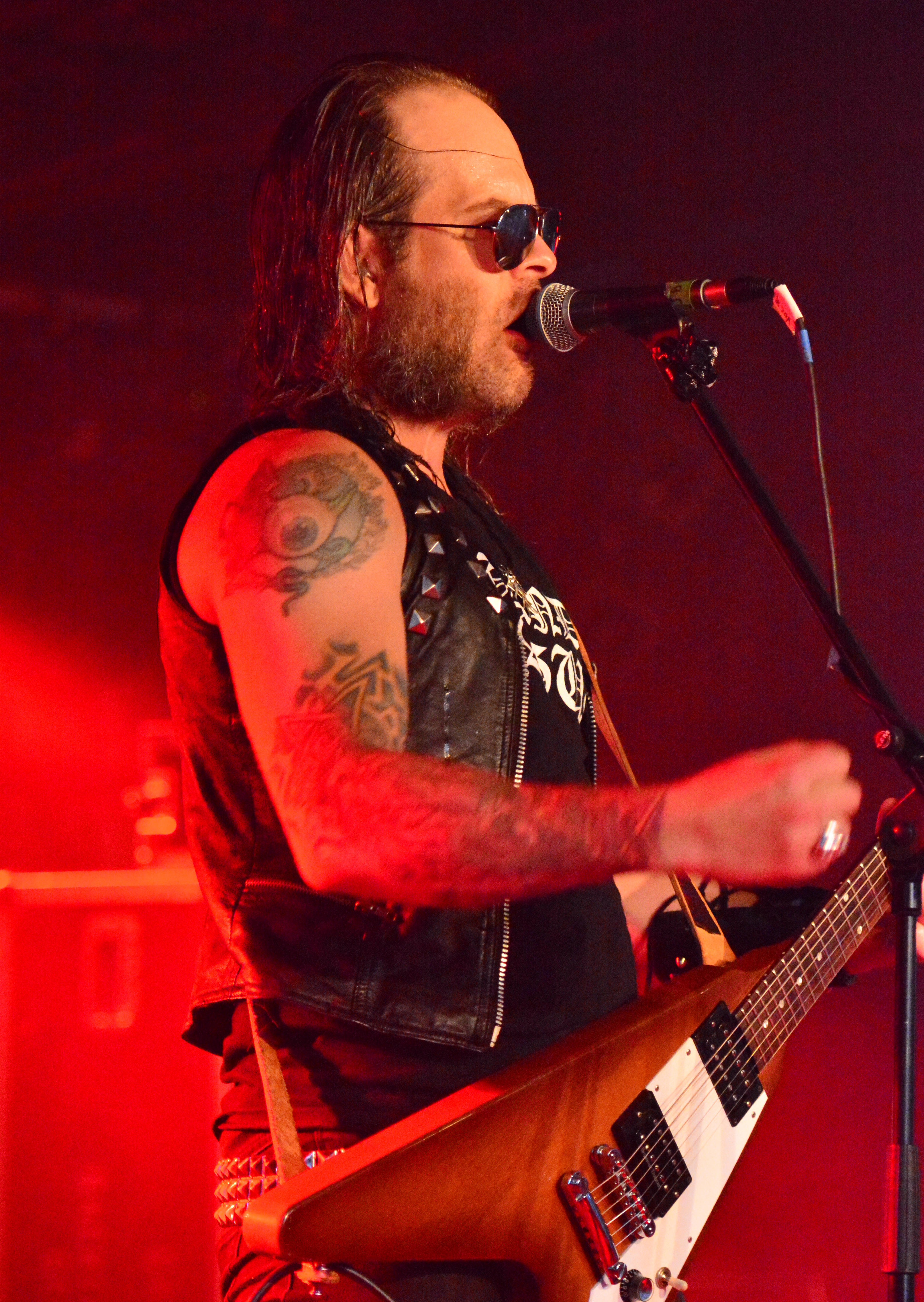 Janne „JB“ Christoffersson von Grand Magus und Spiritual Beggars beim Headbangers Open Air 2014